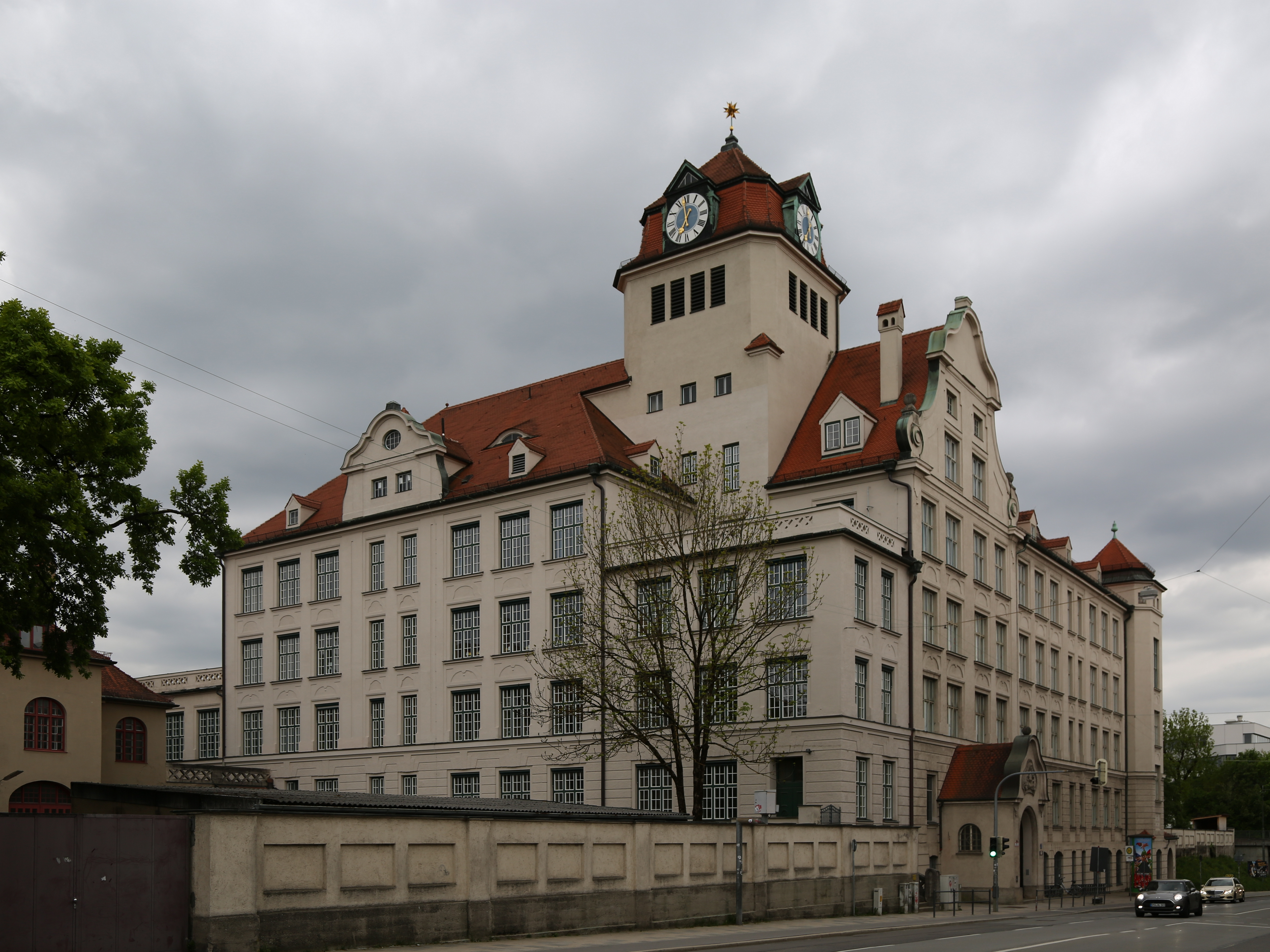 Grundschule an der Boschetsrieder Straße, München-Thalkirchen. historisierend mit Elementen der Neorennaissance und des Jugendstils, 1903/04 von Architekt Robert Rehlen